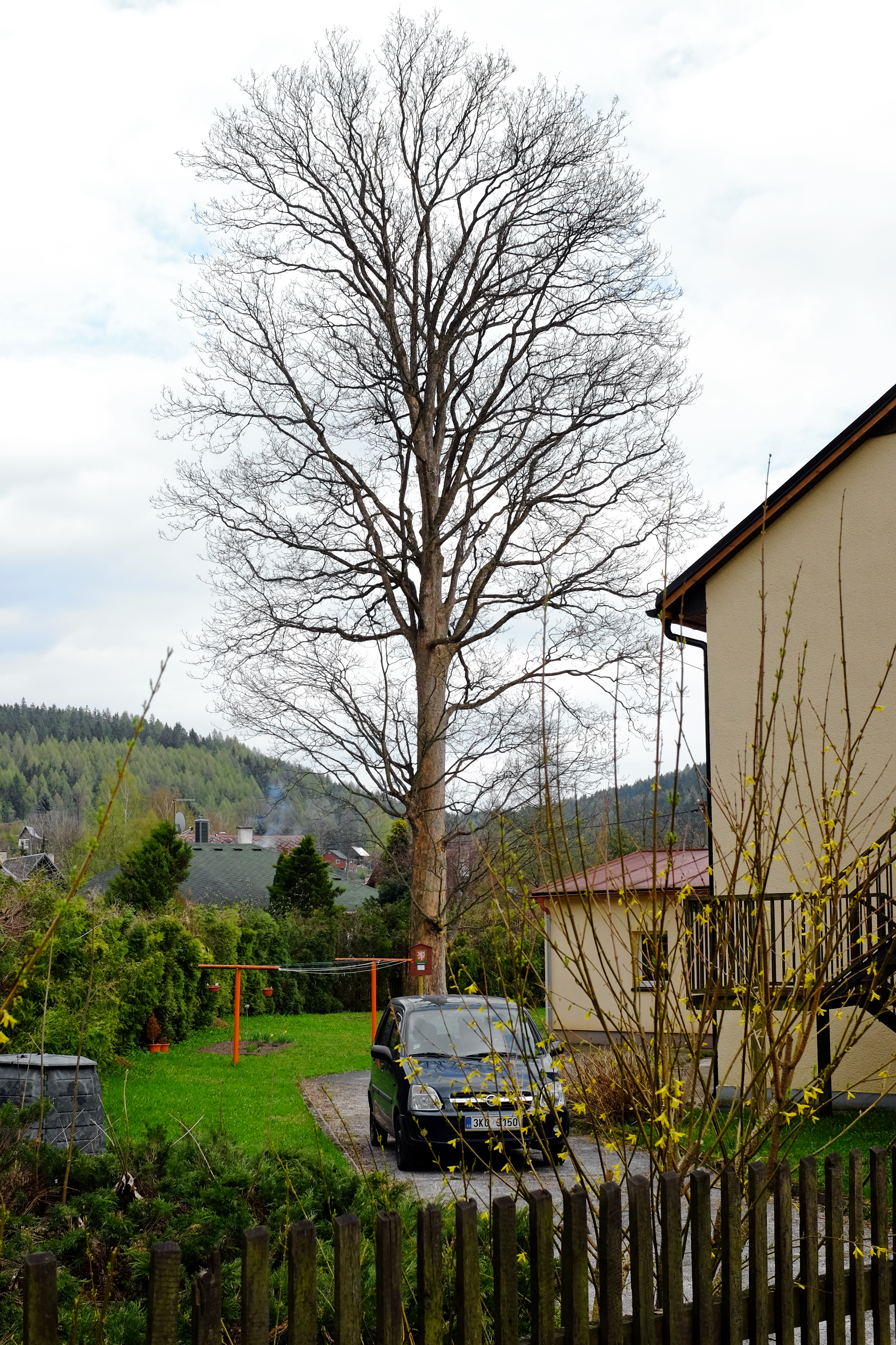 Památný strom - Merklínský javor, Merklín, okres Karlovy Vary